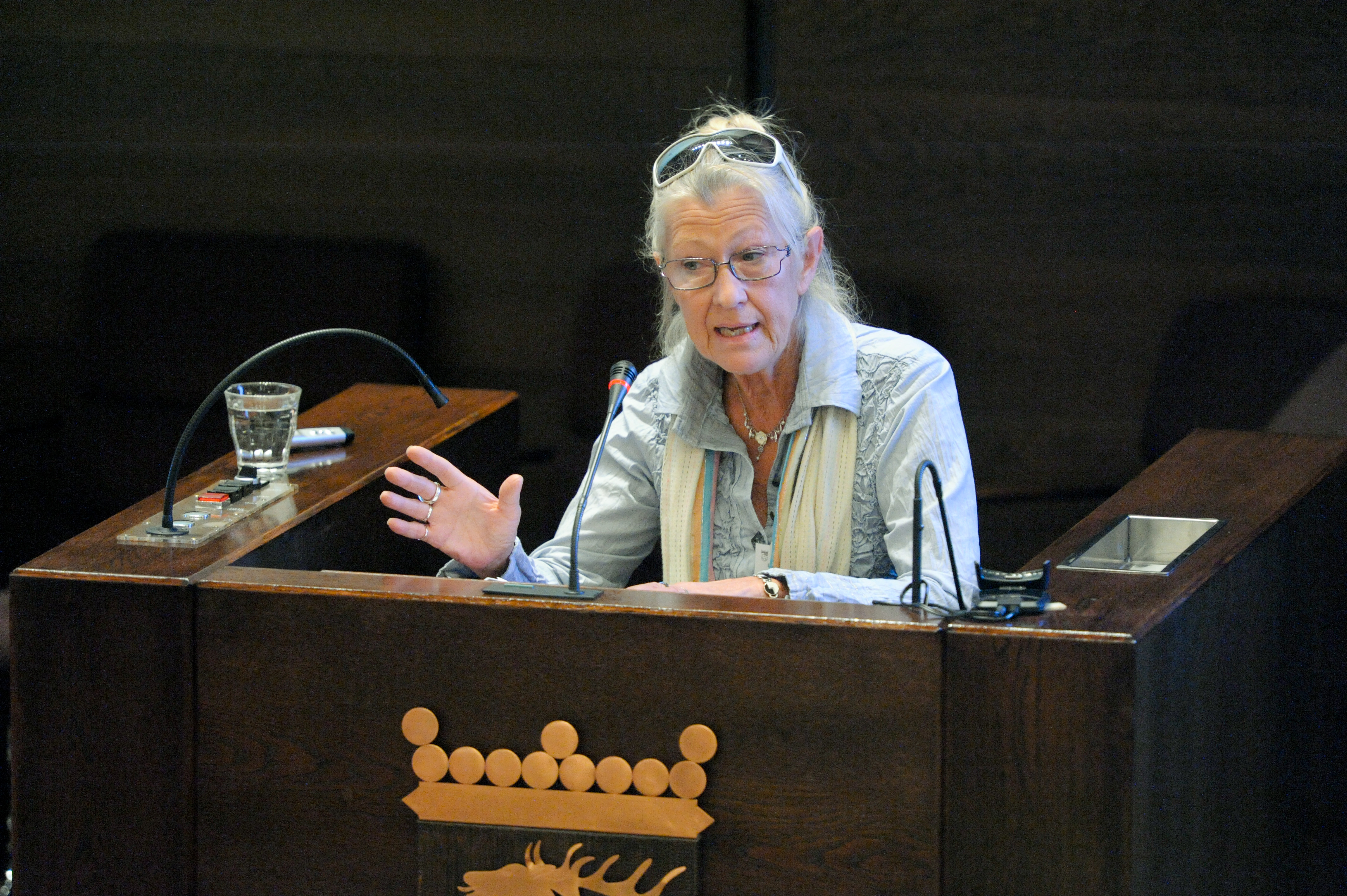 Lisbeth Grönfeldt Bergman (M) Sverige BSPC 19 Mariehamn Åland 2010